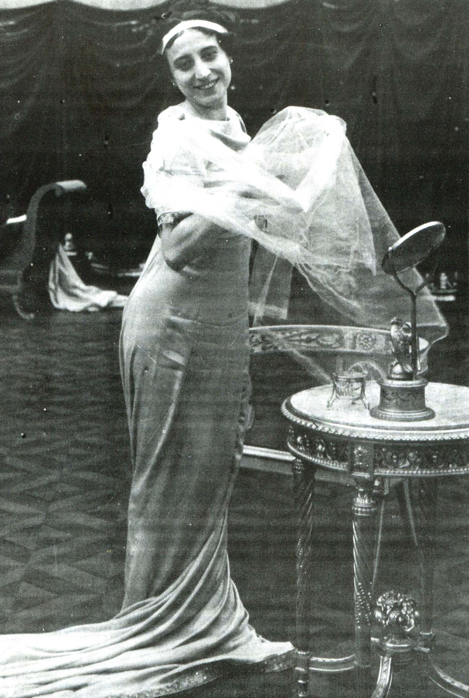 Mary Cléo Tarlarini in Spergiura, produz "Ambrosio" - Torino, 1909